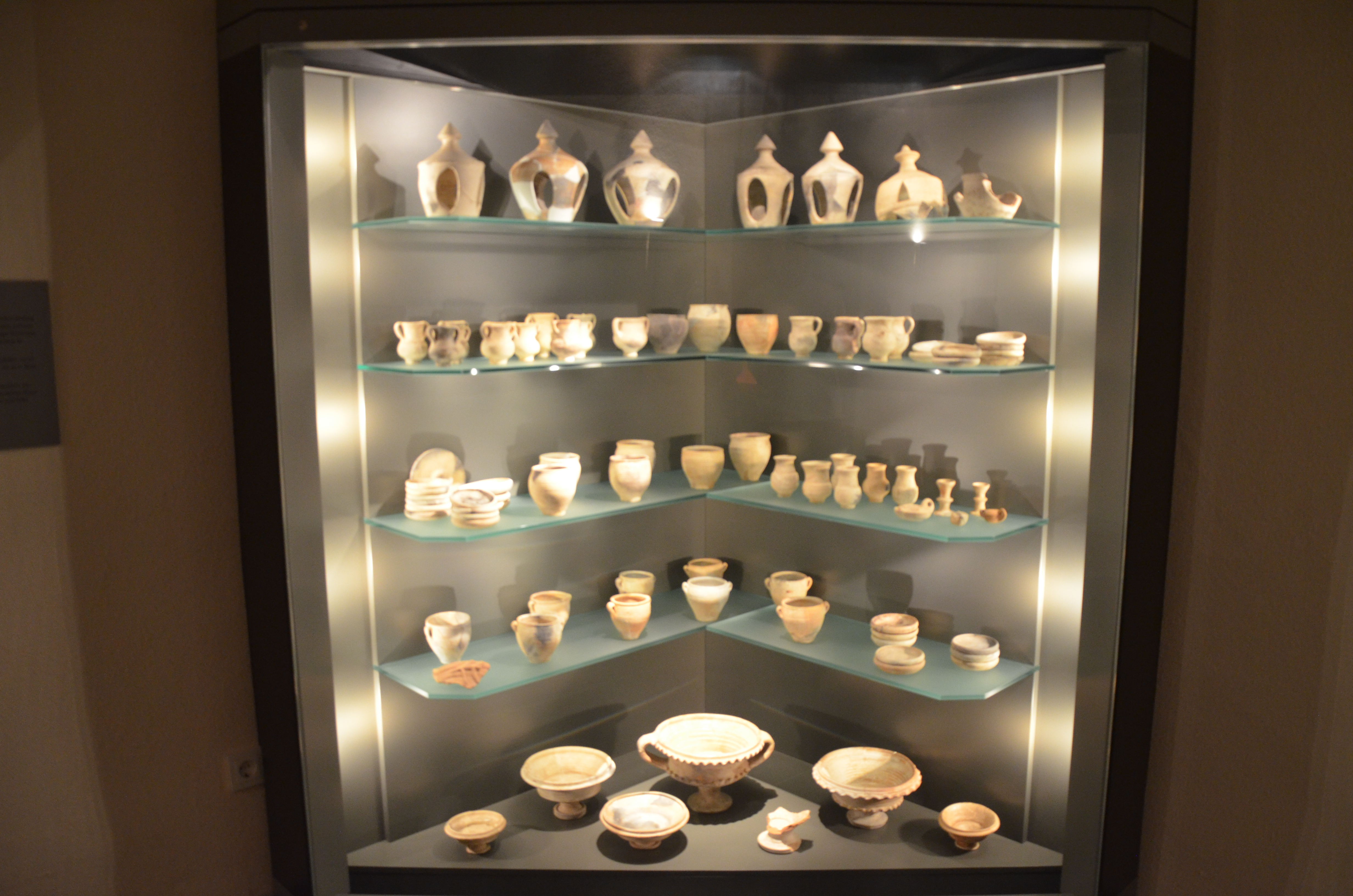 Museum Schloss Fechenbach, Dieburg, Germany